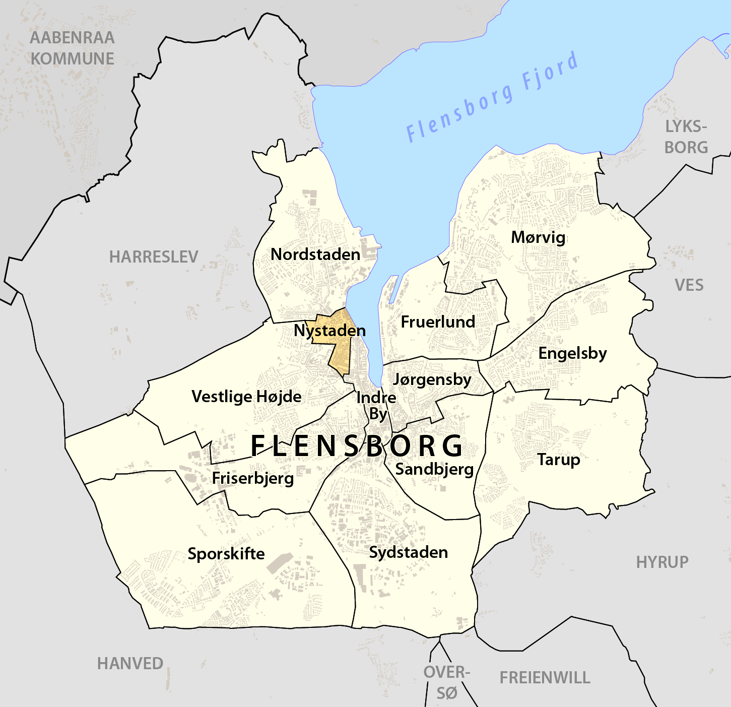 Beliggendhed af Nystaden i Flensborg Kommune